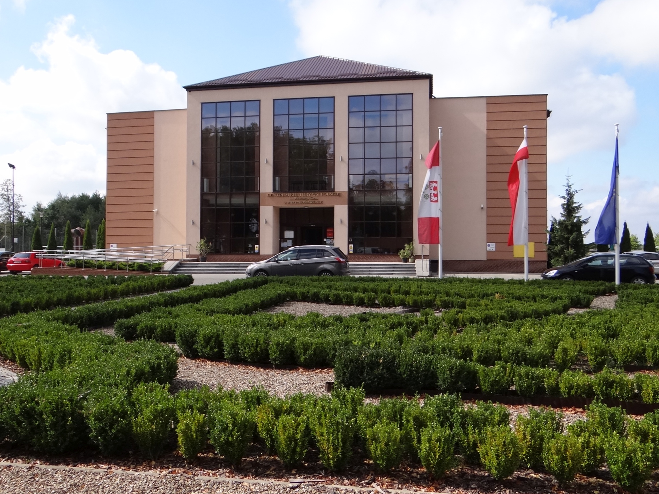 Centrum Kultury Ludowej im Witosa w Wierzchosławicach